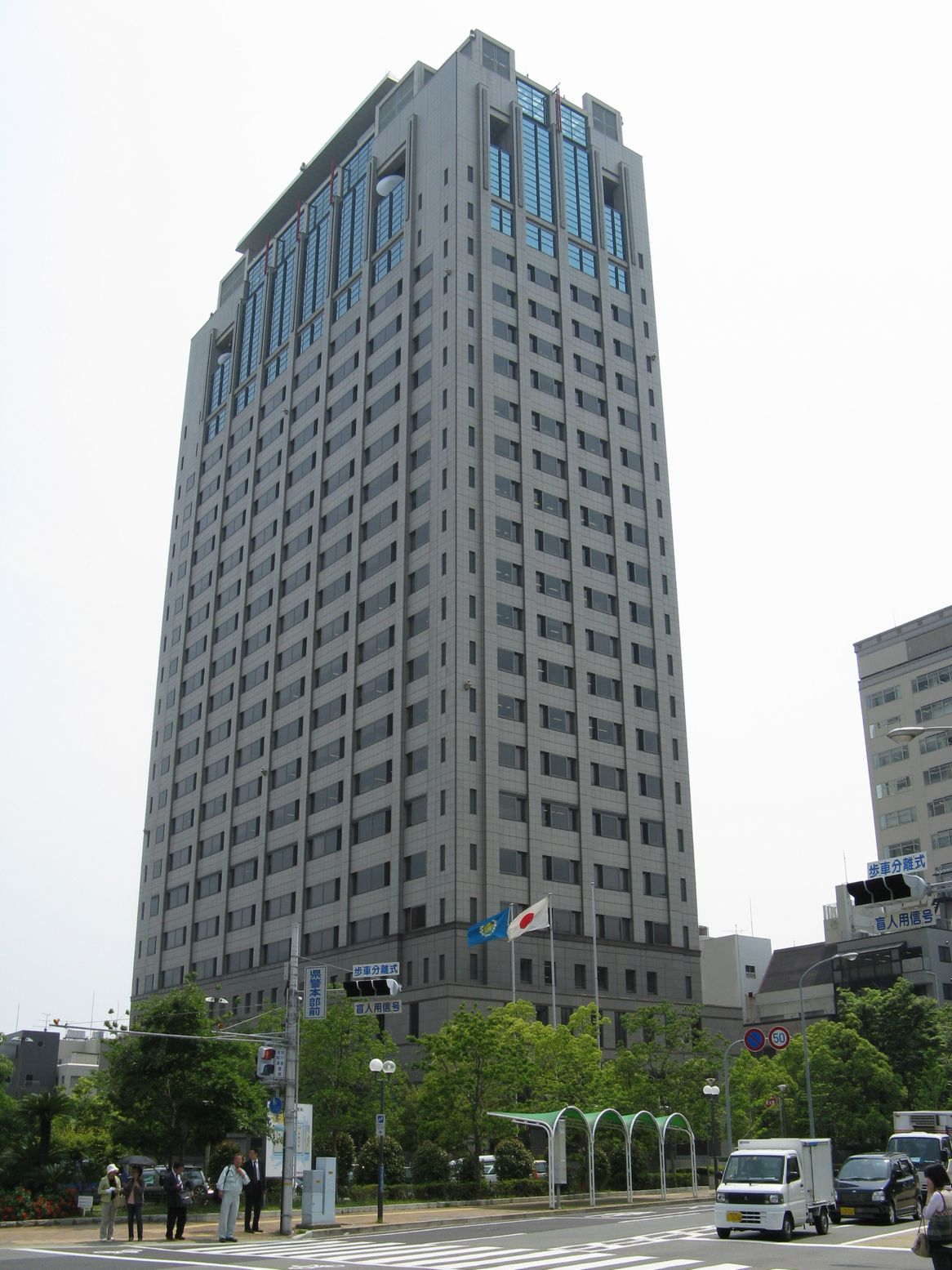 兵庫県警察本部